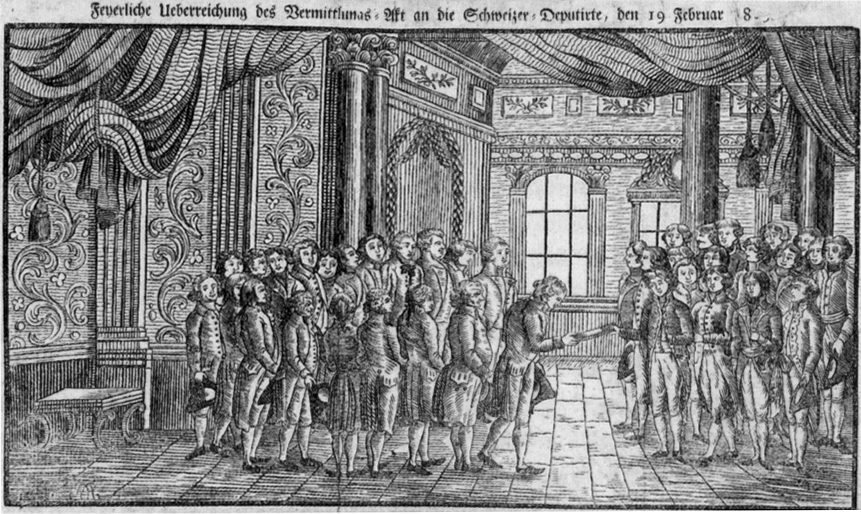 Übergabe der Mediationsakte an die Deputierten der Helvetischen Republik am 19. Februar 1803 im Tuilerienpalast in Paris. Holzschnitt-Kalenderblatt aus dem Staatsarchiv Fribourg